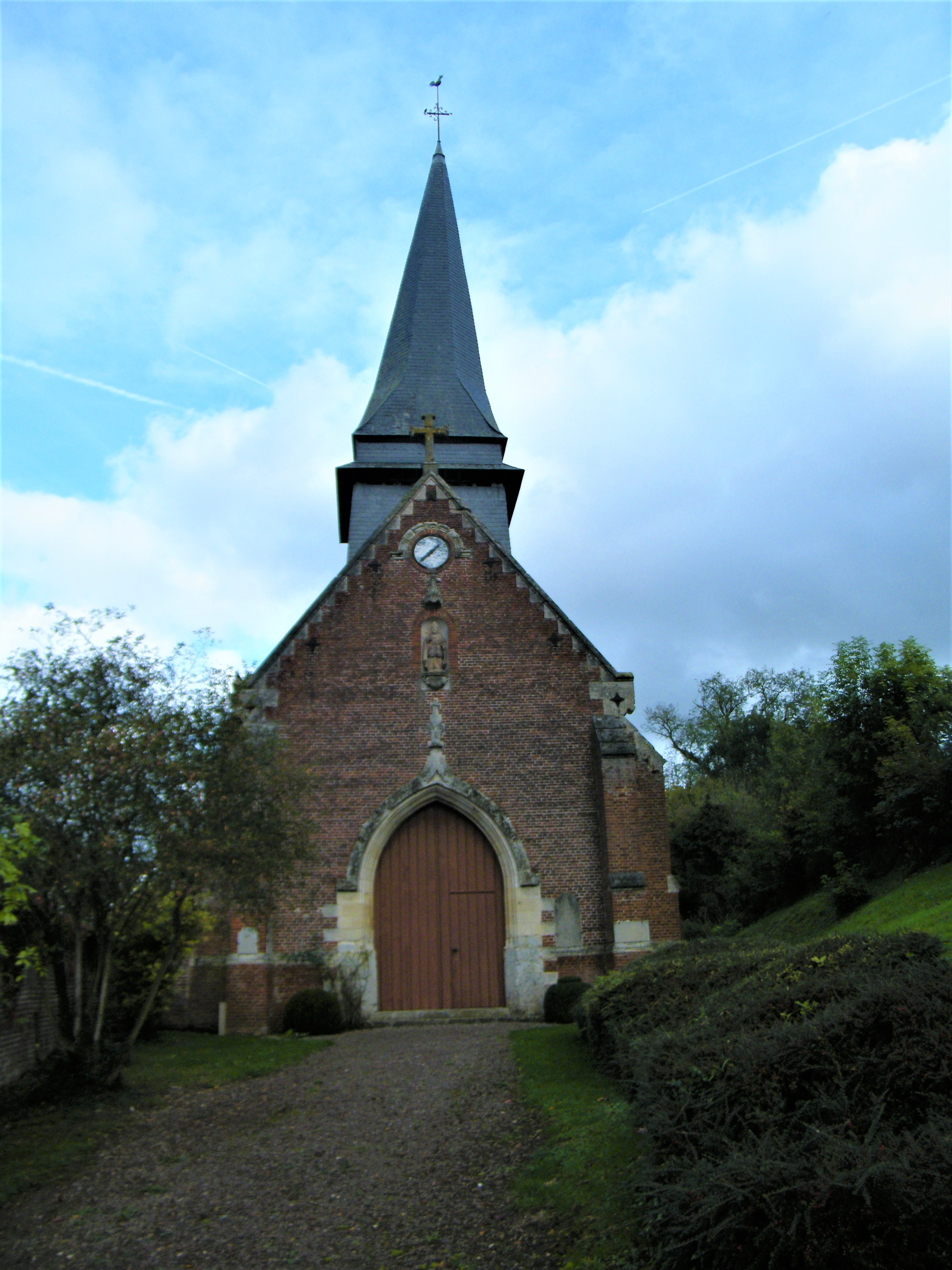 église.